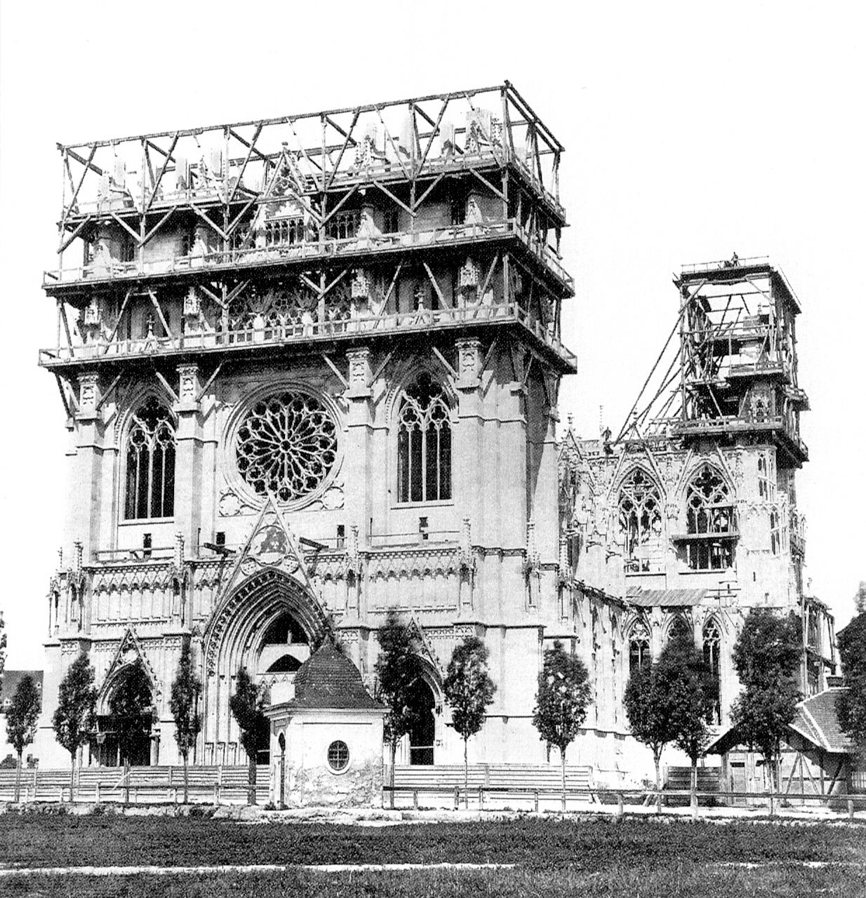 Bau der Votivkirche in Wien